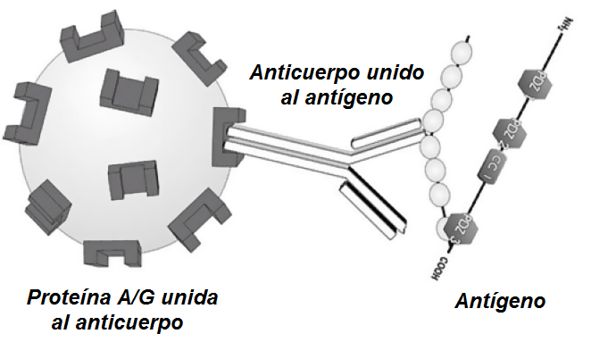 Schema einer Immunpräzipitation. Ein Lysat wird zusammen mit einem spezifischen Antikörper inkubiert. Dieser Antikörper bindet an sein Zielprotein und wird über Protein A/G-Beads präzipitiert. Etwaige Interaktionspartner des Zielproteins, die an dieses gebunden sind, werden mit dem Zielprotein kopräzipitiert. Der Interaktionspartner wird im Western Blot nachgewiesen.